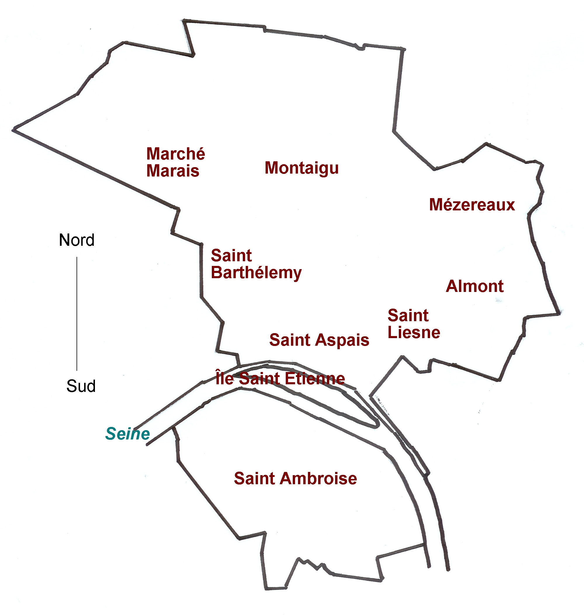 Limites de Melun, avec l'emplacement de ses quartiers.